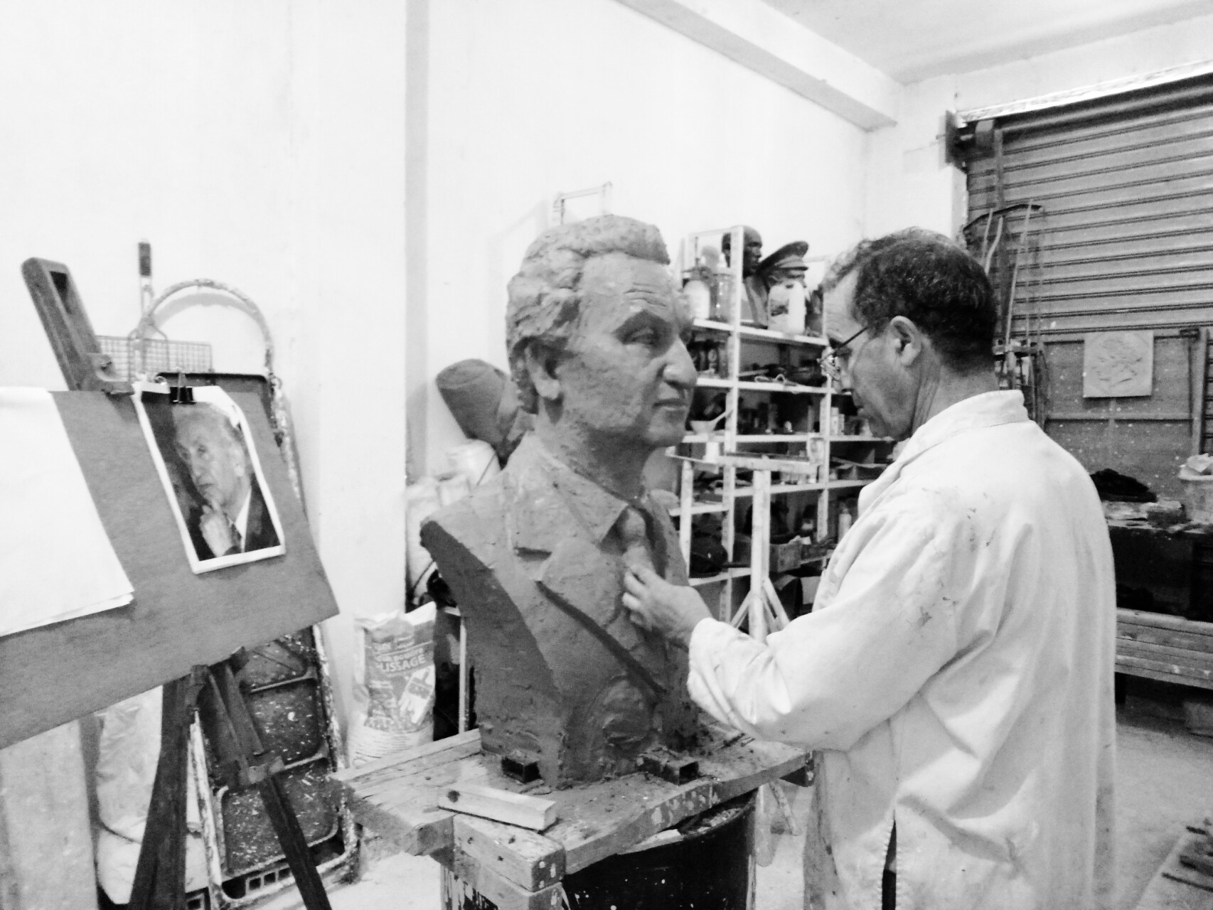 Le sculpteur algerien Bâaziz Hammache en train de sculpté le buste de hocine ait Ahmed le fondateur de ffs dans son atelier en kabylie